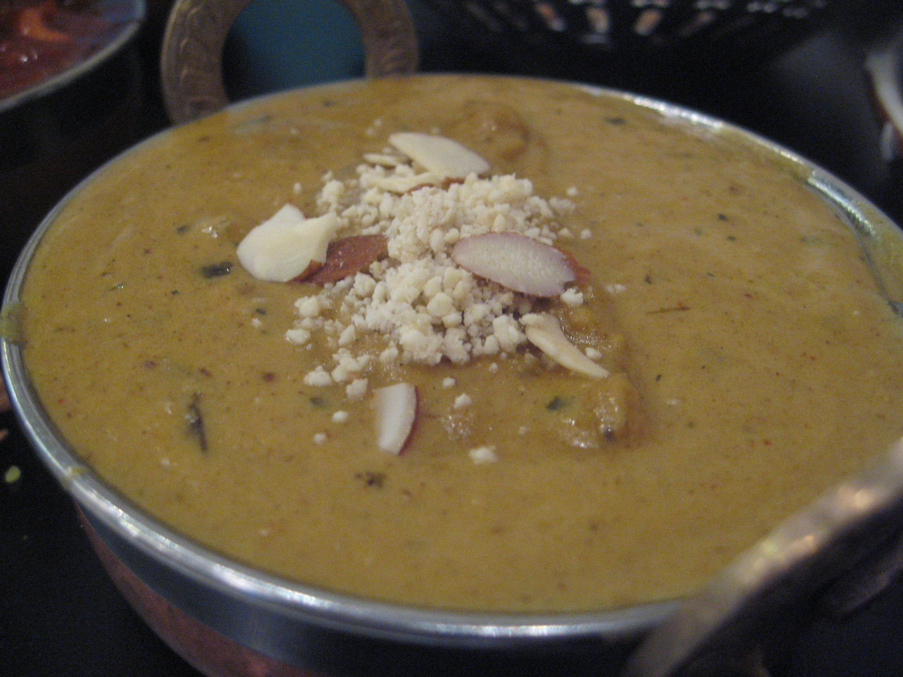 Malai Kofta Side dish